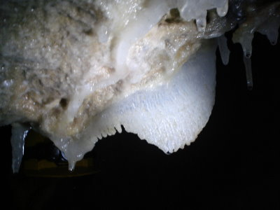 Draperie dans une grotte près de Nefza (Tunisie)